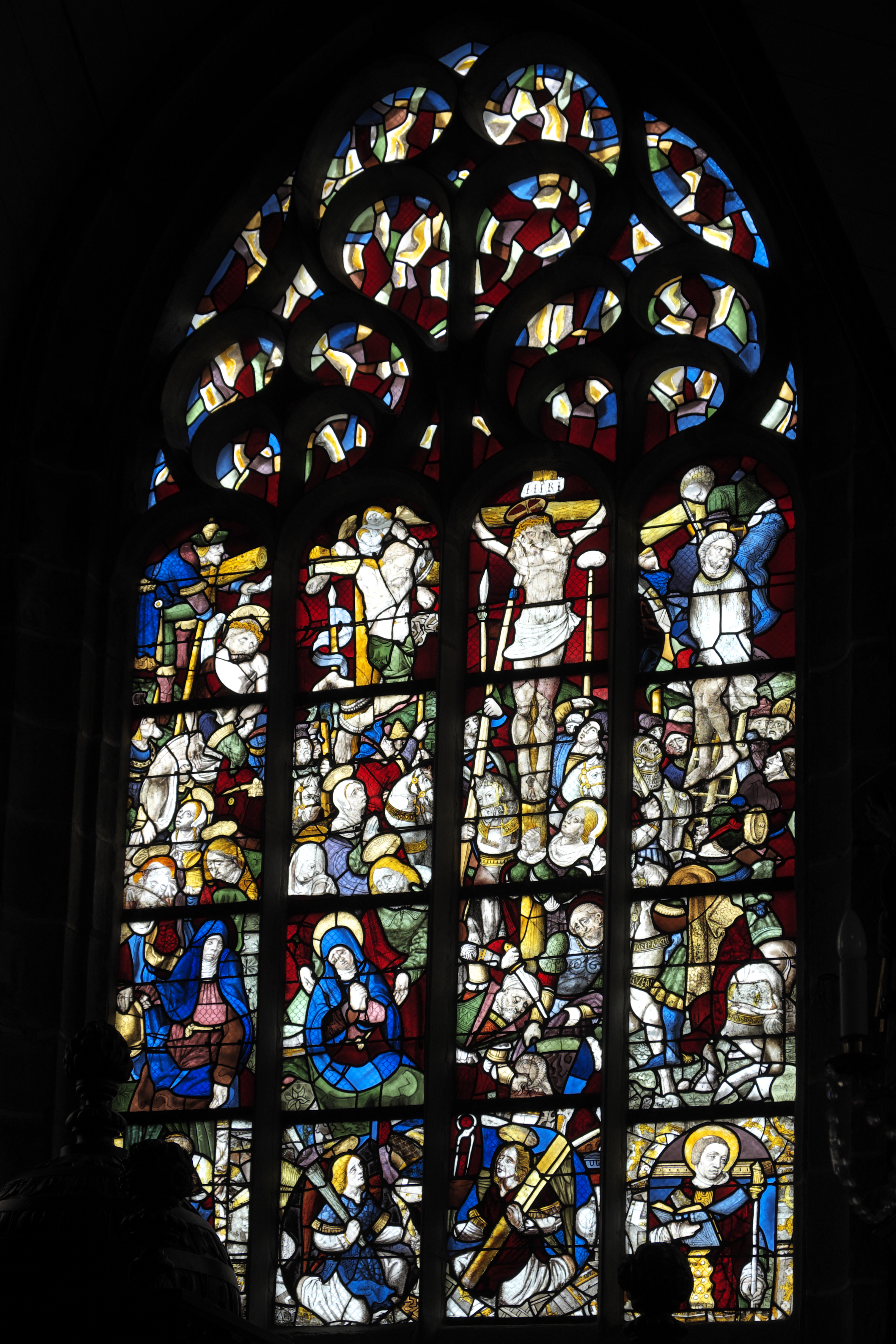 Kreuzigungsfenster in der katholischen Pfarrkirche Saint-Miliau in Guimiliau im Département Finistère (Region Bretagne/Frankreich), um 1550